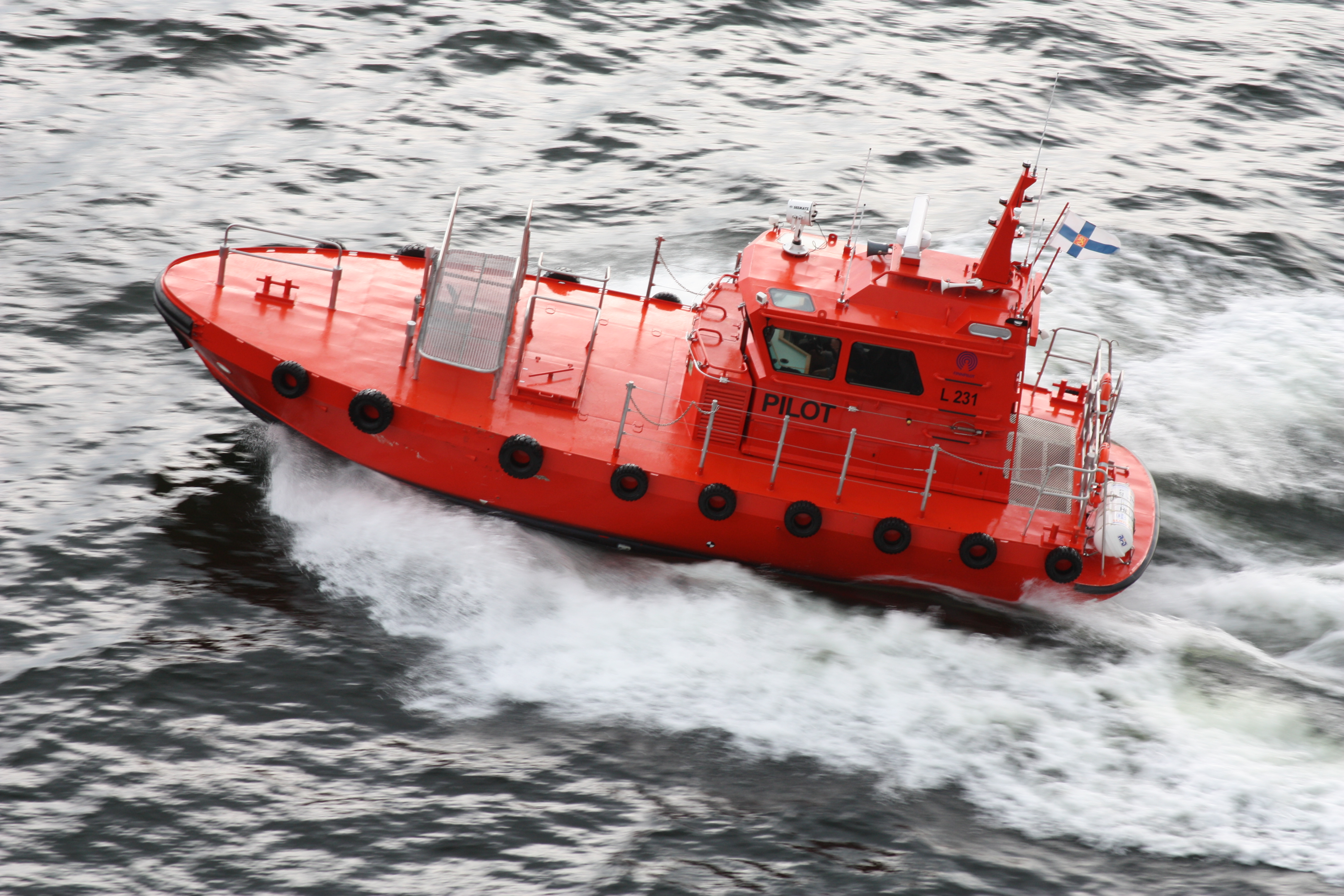 Lotsenboot vor Helsinki; Finnlandv